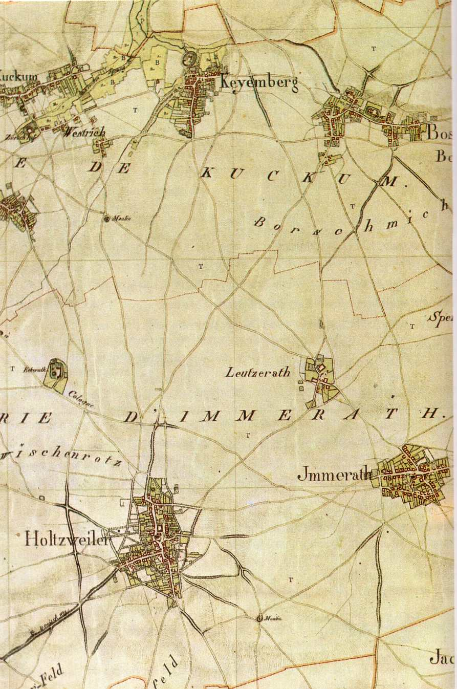 Map of Kuckum, Holzweiler, Immerath; Kartenaufnahme des Rheinlands von Tranchot/Müffling, (Aufnahme von 1806/07)